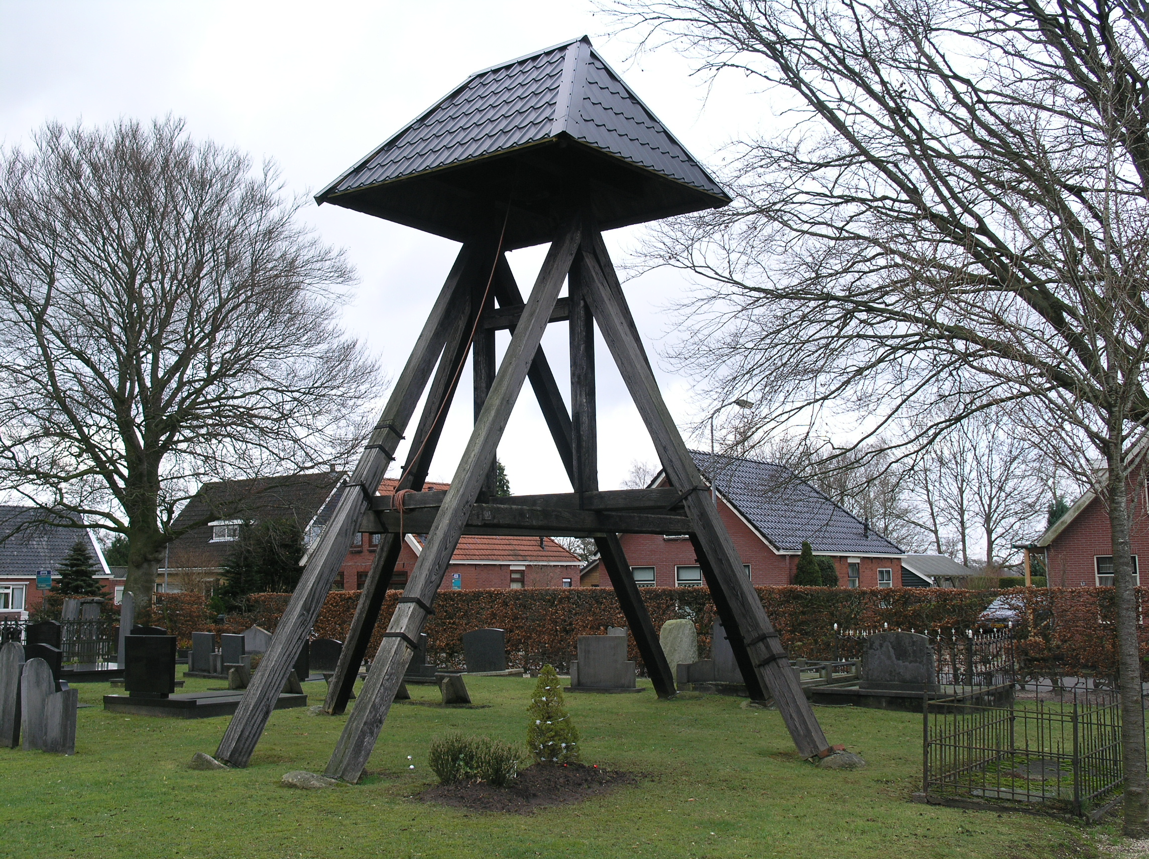 De Wilp Klokkenstoel